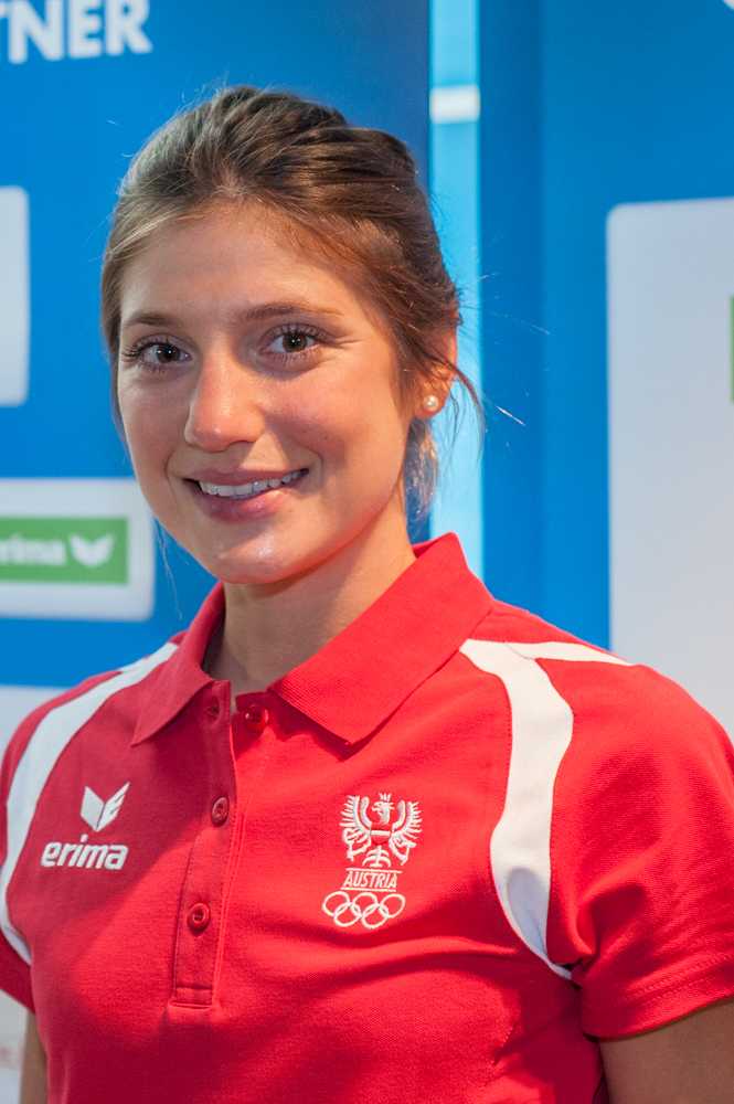 Einkleidung der Österreichischen Teilnehmer an den Olympischen Sommerspielen 2016 am 16./17. Juli 2016 in Wien. Bild zeigt Lisa Perterer.